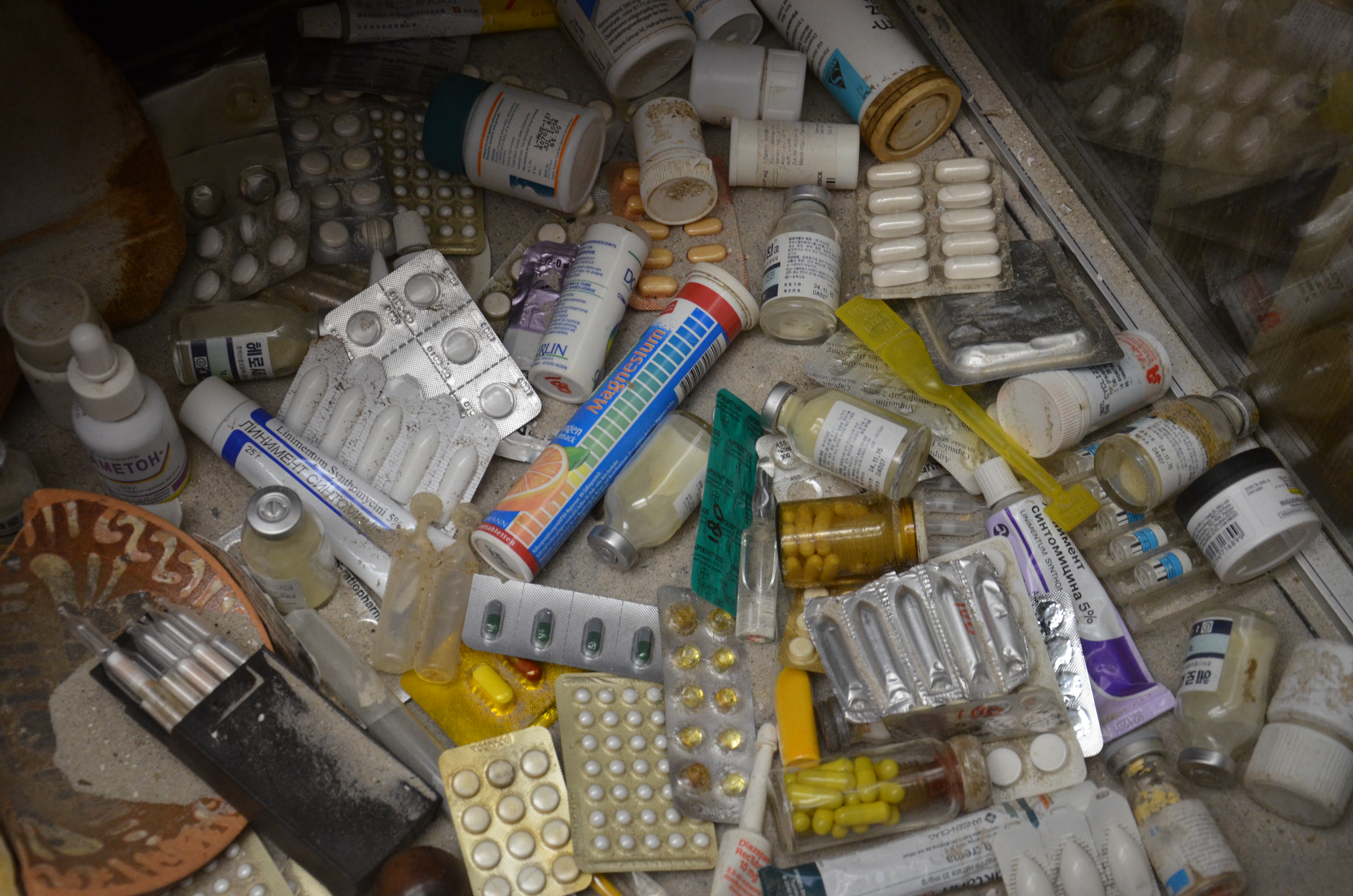 Een verzameling medicijnen.